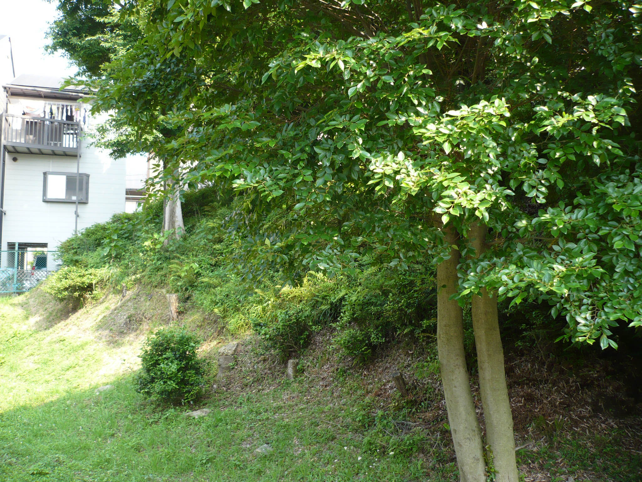 東側にある土塁跡